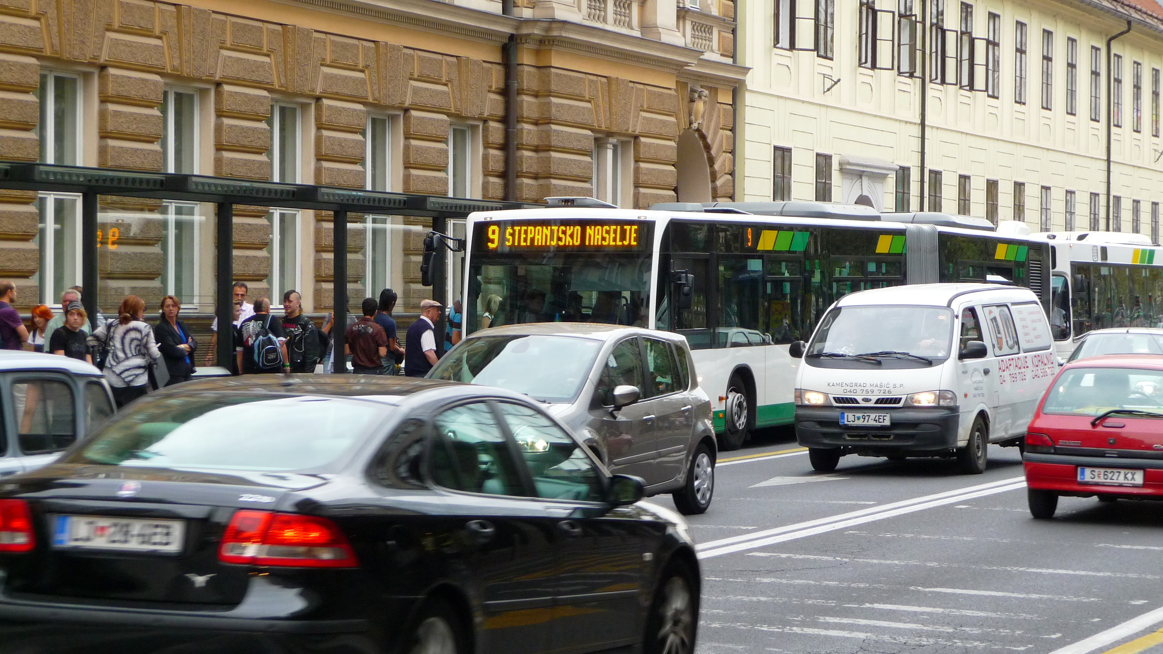 Bus in Ljubljana, Slovenia, September 2011 (3)